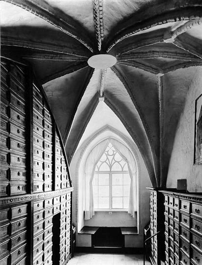 Staatsarchiv im Schloss [Königsberg]